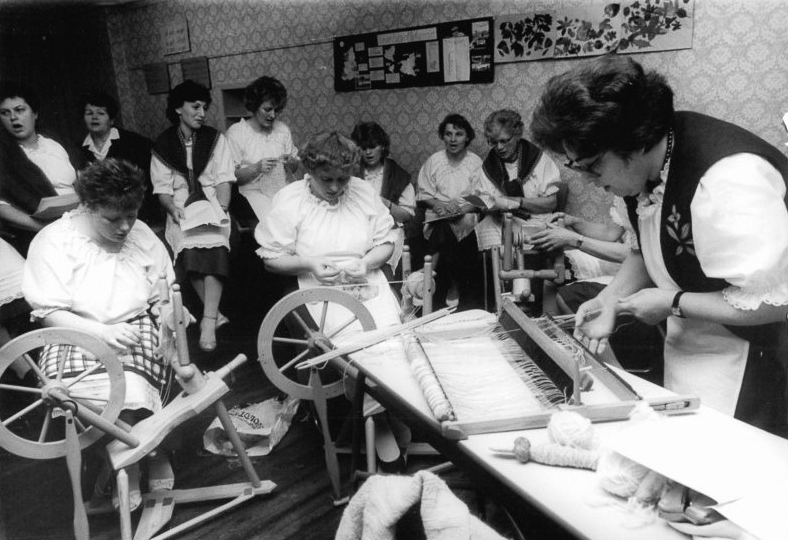 Alt Meteln, Handarbeitsgruppe Zum Beitrag: Woll-Lust am Dienstagabend - Alt Metelner Frauen spinnen einen guten Faden ADN-ZB Pätzold - 4.2.1988 - Frauen aus der Gemeinde Alt Meteln im Landkreis Schwerin treffen sich in den Winterwochen regelmäßig zum Singen von Volksliedern und Musizieren in geselliger Runde. Dabei surren auch die traditionellen Spinnräder. (Hierzu gehören die Fotos 1988-0204-300N-302N!)